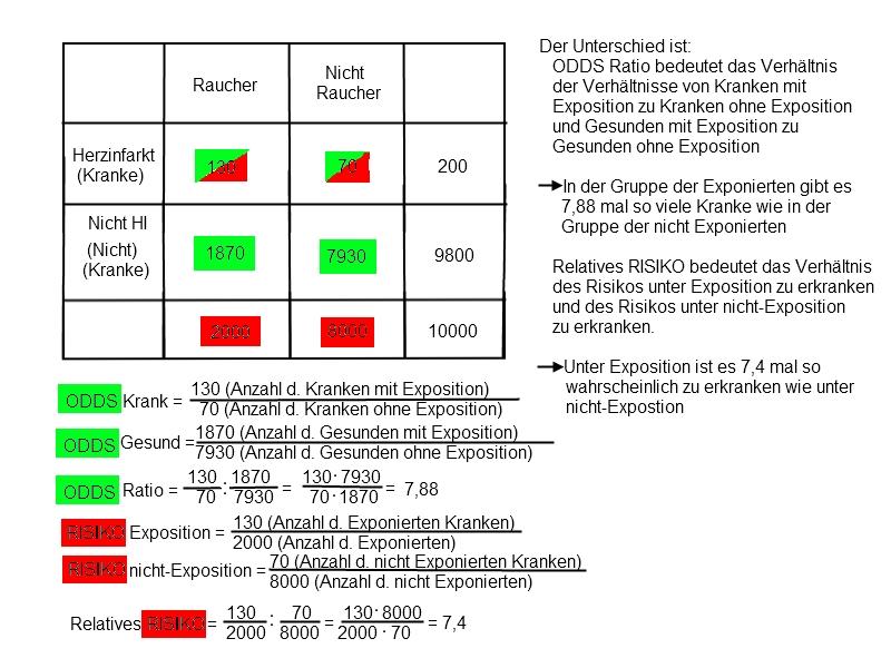 Selbst gemacht UnitX 00:07, 17. Apr. 2010 (CEST)